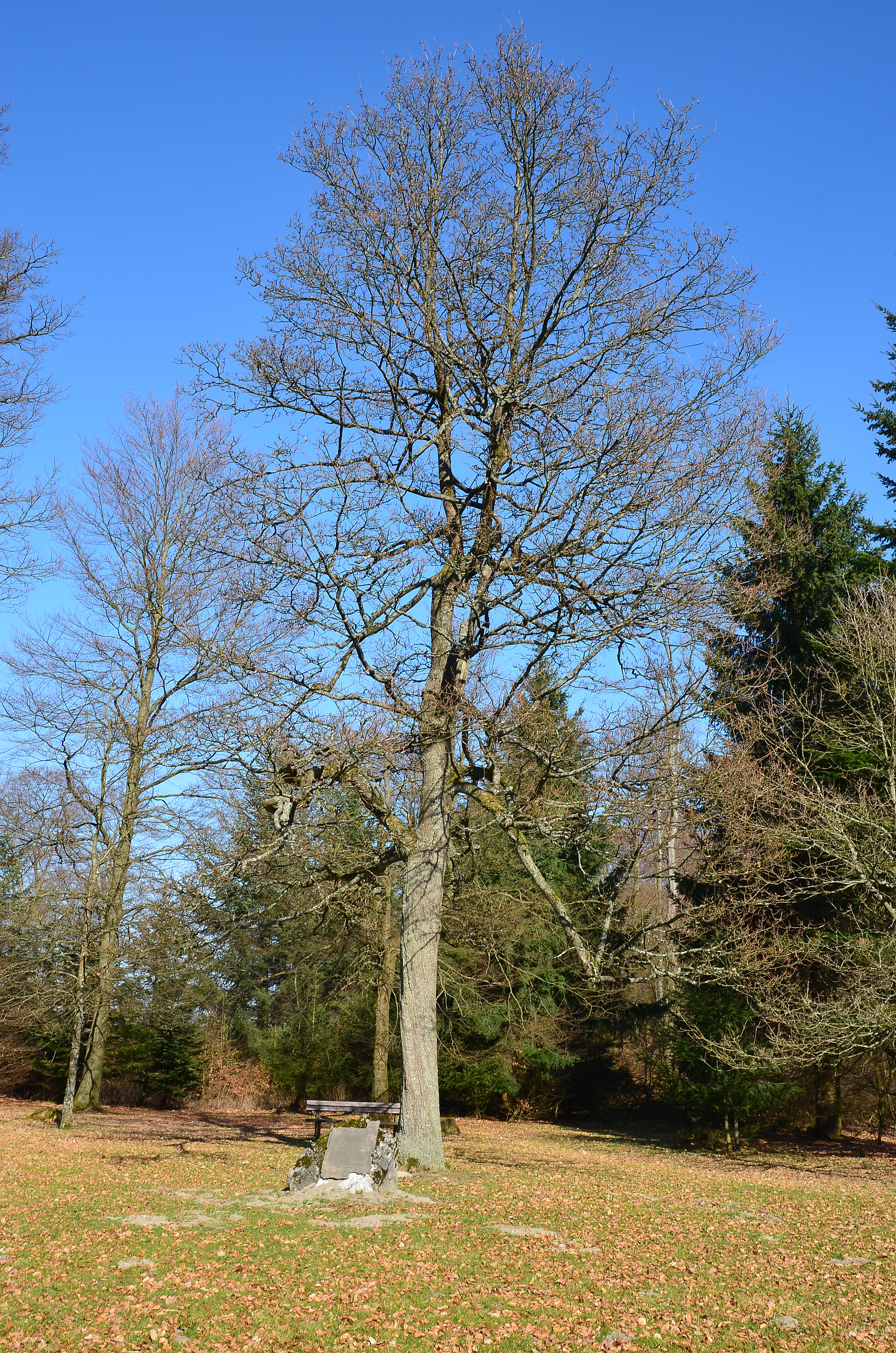 Brilon, Borberg, die Friedenseiche